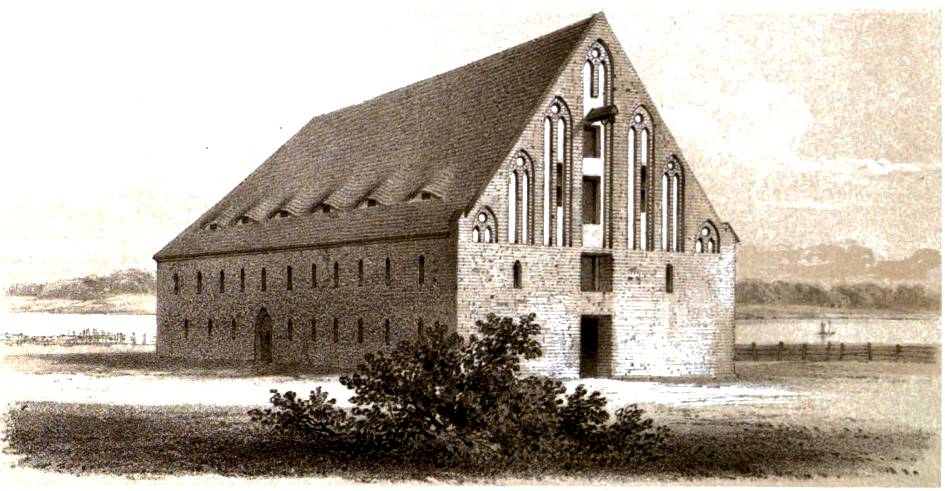 Das sogenannte Brauhaus des ehemaligen Klosters Himmelpfort von Norden; Provinz Brandenburg.